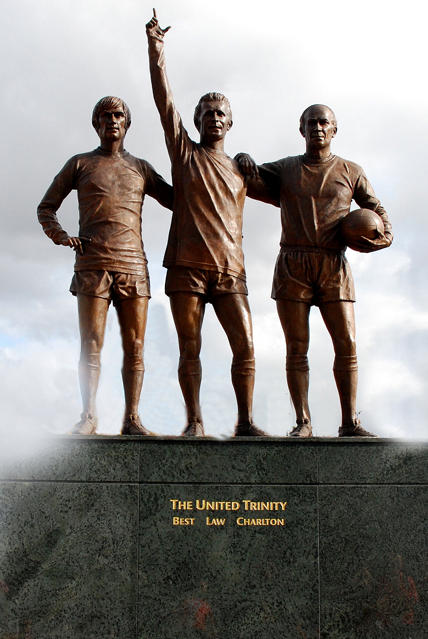 Standbeeld van George Best, Denis Law en Bobby Charlton bij het voetbalstadion van Manchester United in Manchester, Engeland